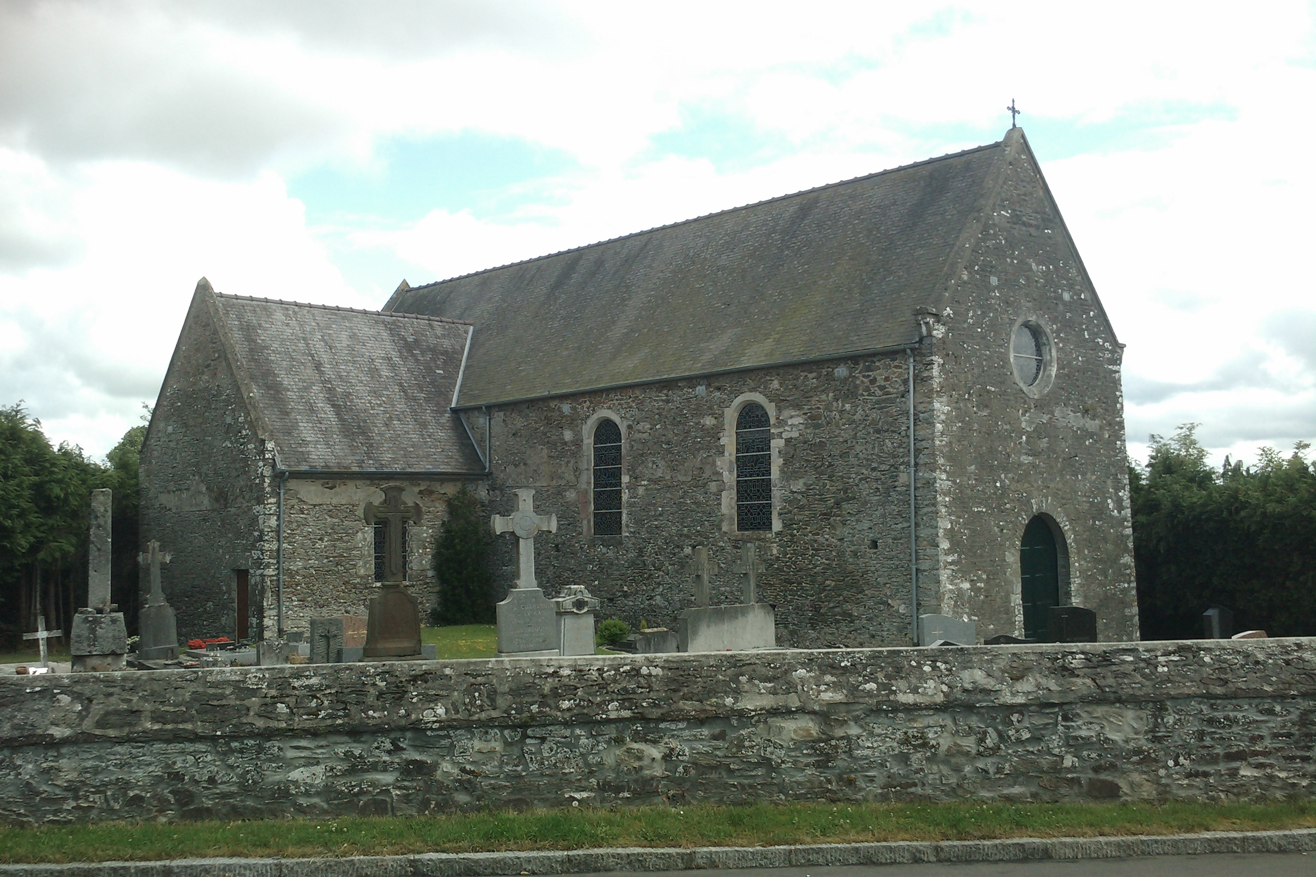 Église Saint-Pierre de La Luzerne